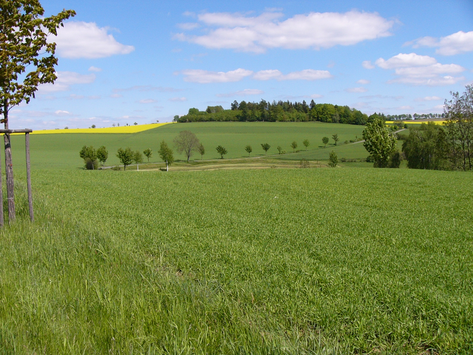 Bergkuppe mit Wäldchen markiert die Flurbezeichnung Judenbegräbnis, Nahe Oberkotzau